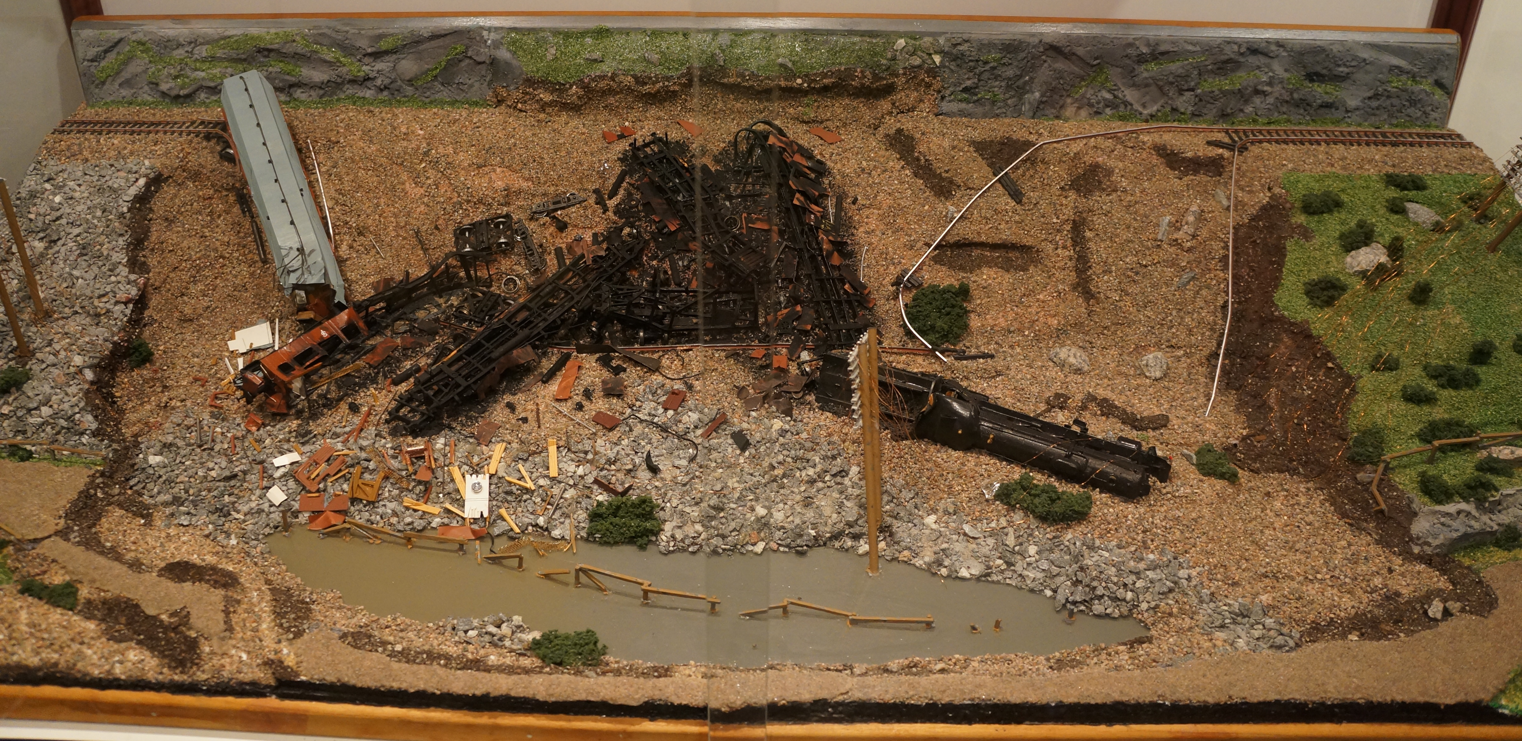 Korrekt byggd modell av Järnvägsolyckan i Getå.